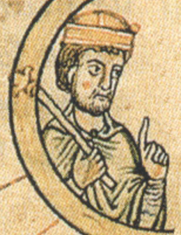 JIndřich I. Ptáčník